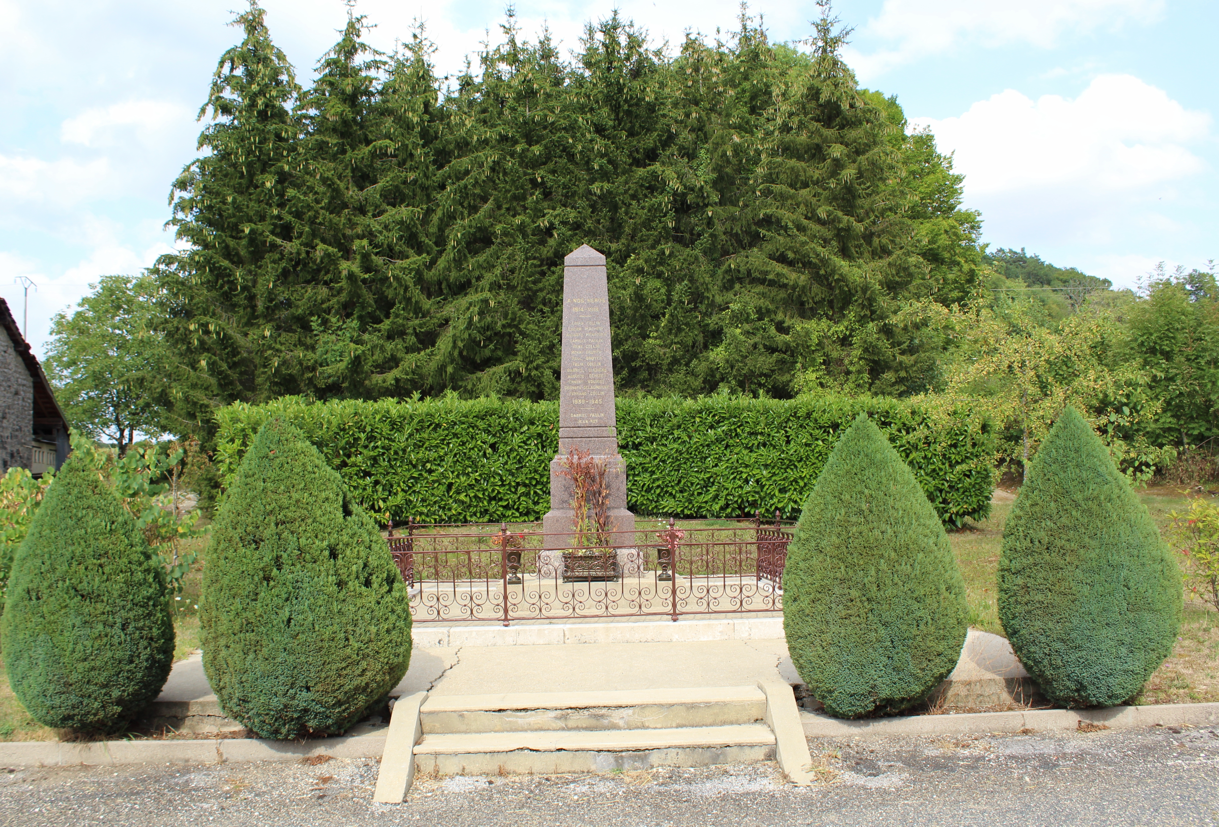 Le monuemnt aux morts.